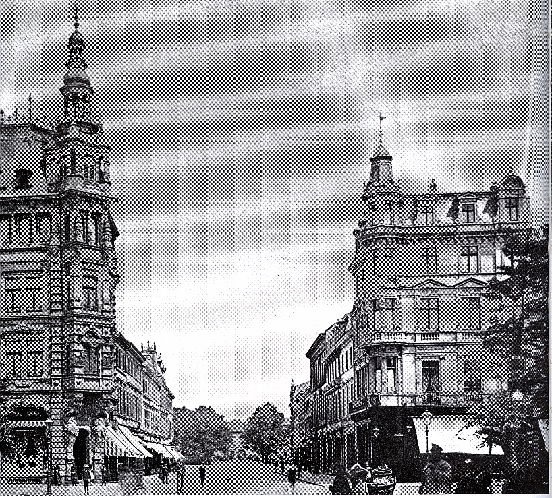 Düsseldorf, Blick in die Elberfeldstraße von der Alleestraße. Rechte Ecke befindet sich das Wohn- und Geschäftshaus Alleestraße 26, Ecke Elberfeldstraße, erbaut 1878, Architekten Bernhard Tüshaus & von Leo von Abbema, für Hoflieferant Johann Peters. Linke Ecke Alleestraße 24, Ecke Elberfeldstraße, erbaut 1882 bis 1883 von den Architekten Otto van Els & Bruno Schmitz, das Wäsche- und Leinen-Ausstattungsgeschäft der Witwe Schmitz-Lenders.jpg Düsseldorf, Elberfeldstraße. Rechts Eckhaus Johann Peters Alleestr. 26, (Bernhard Tüshaus & von Leo von Abbema, 1878). Links Eckhaus Witwe Schmitz-Lenders(Otto van Els & Bruno Schmitz, 1882-1883).jpg